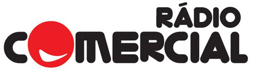 Logótipo da rádio portuguesa Rádio Comercial